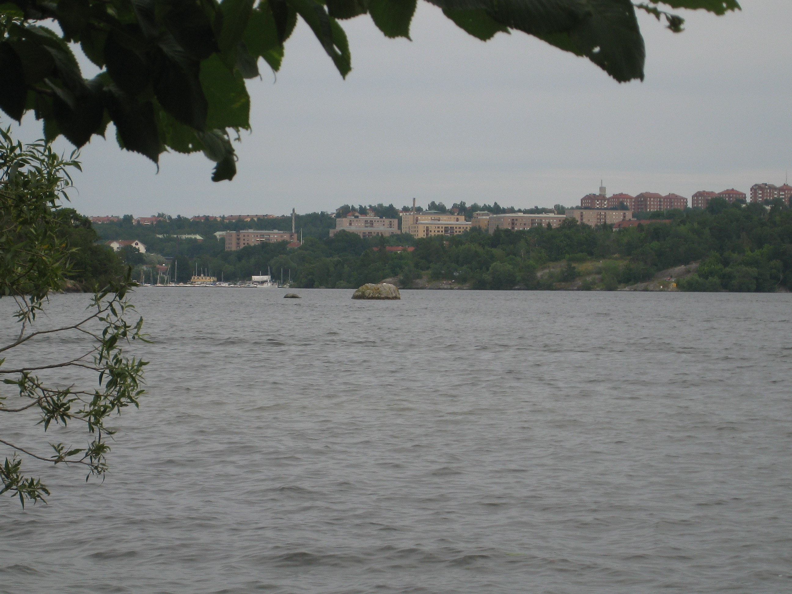 Ålstensängens natur i stadsdelen Ålsten i södra Bromma väster om Stockholm. Stenblocket Ålstenen ute i Mälaren, söder om Ålstensängen, 50 meter utanför strandlinjen.